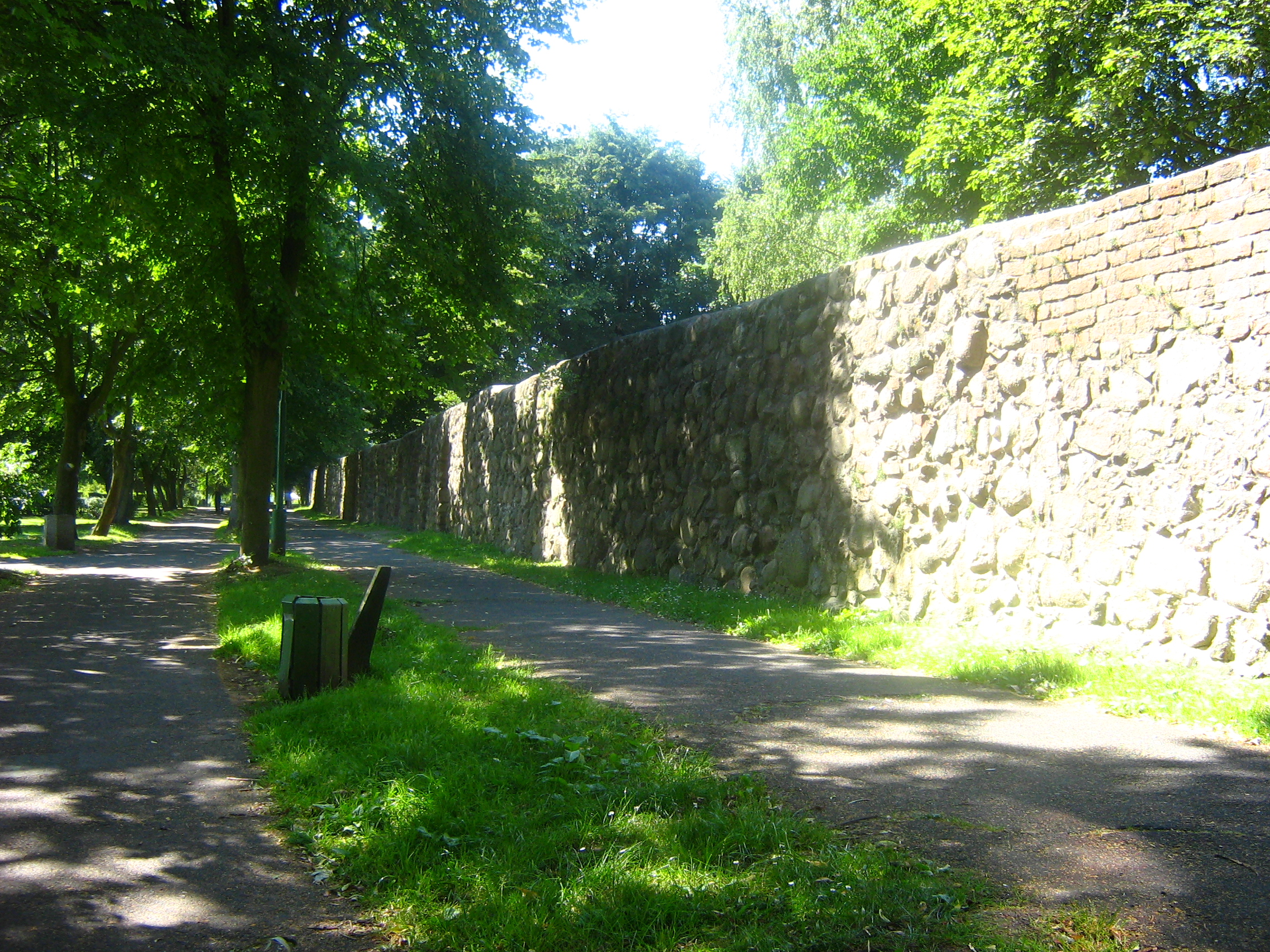 Mury miejskie w Nowogardzie